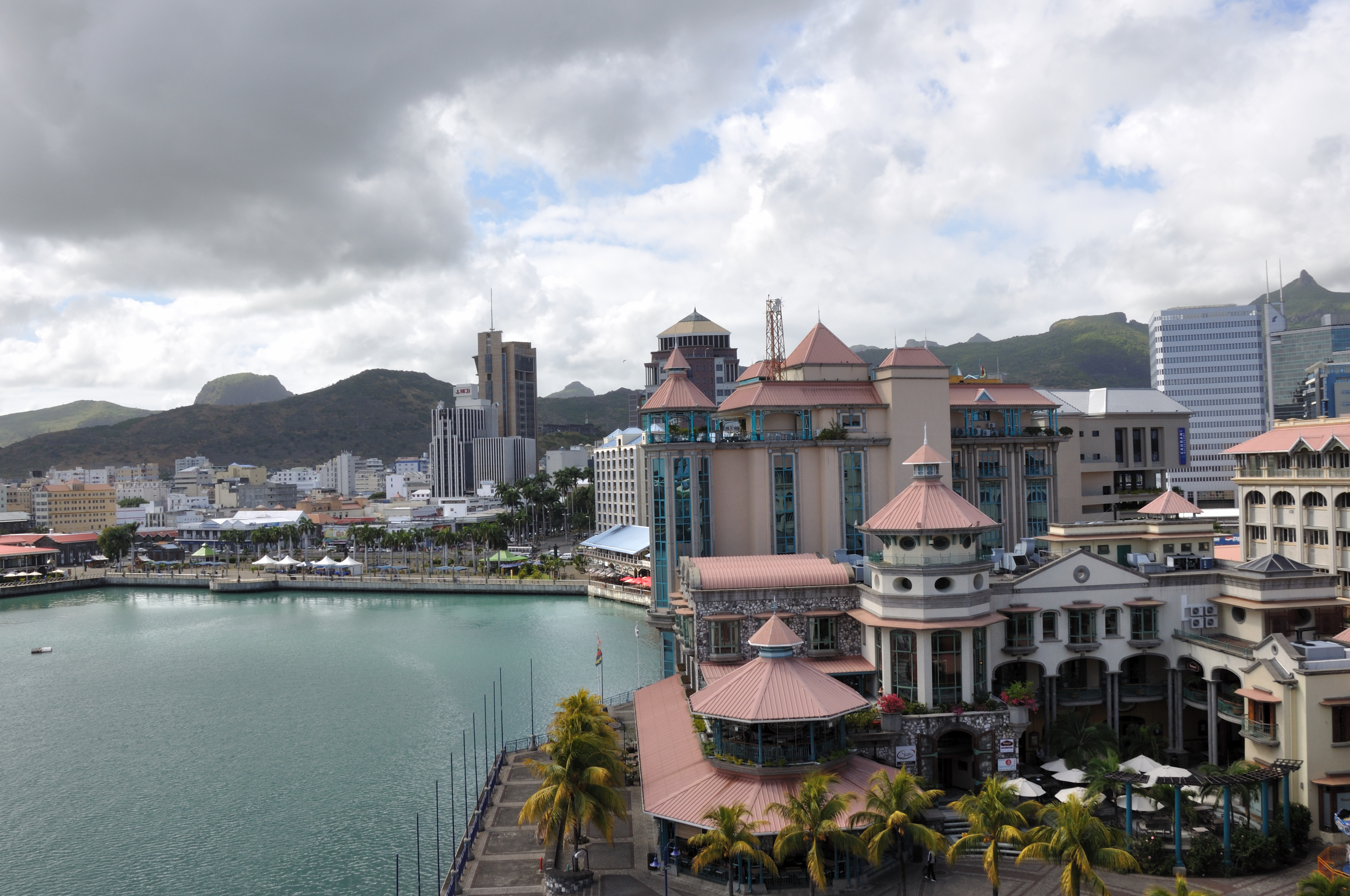 Mauritius, Port Louis